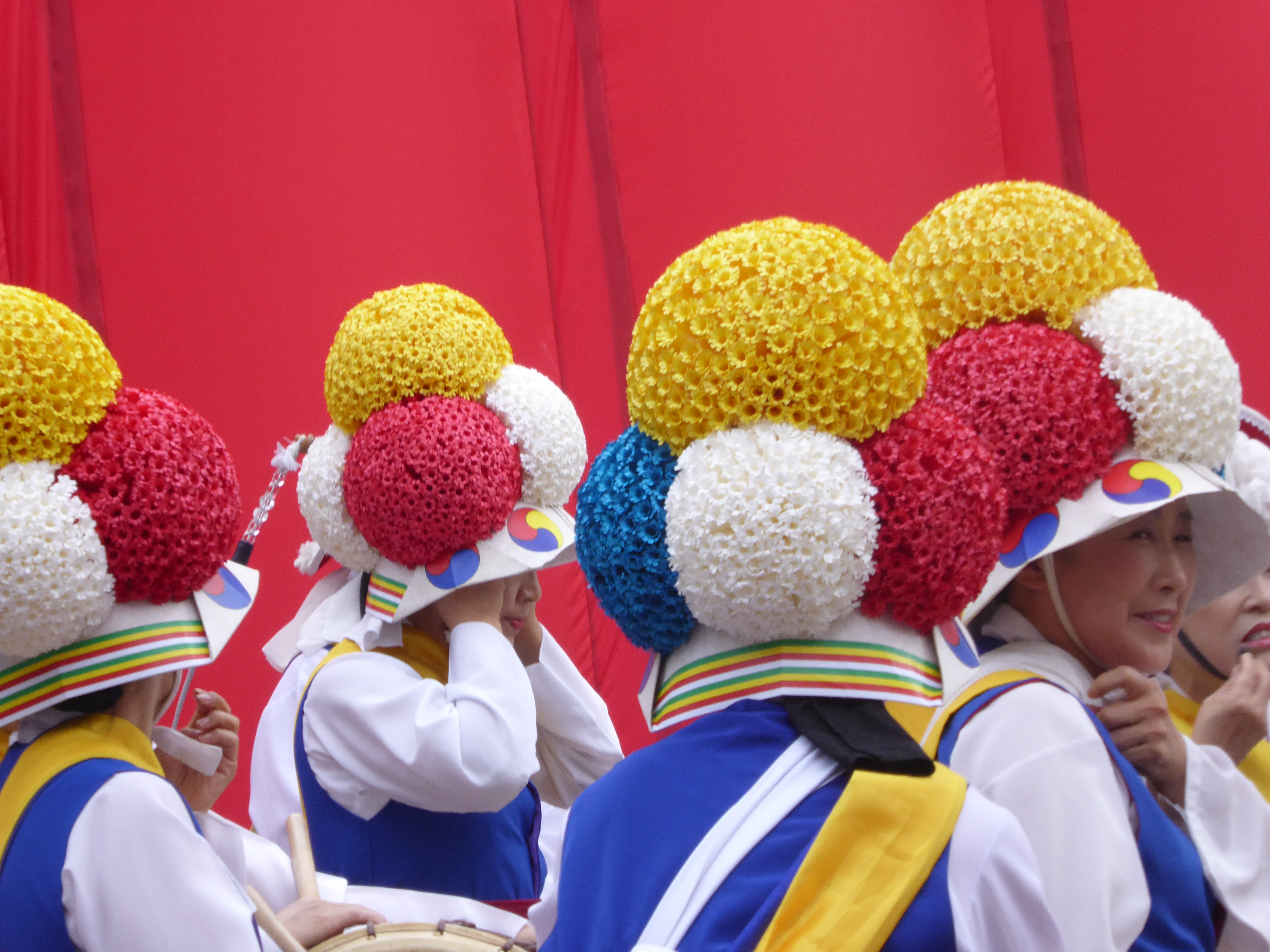 종이꽃으로 장식한 고깔을 쓰고 있는 풍물놀이패.